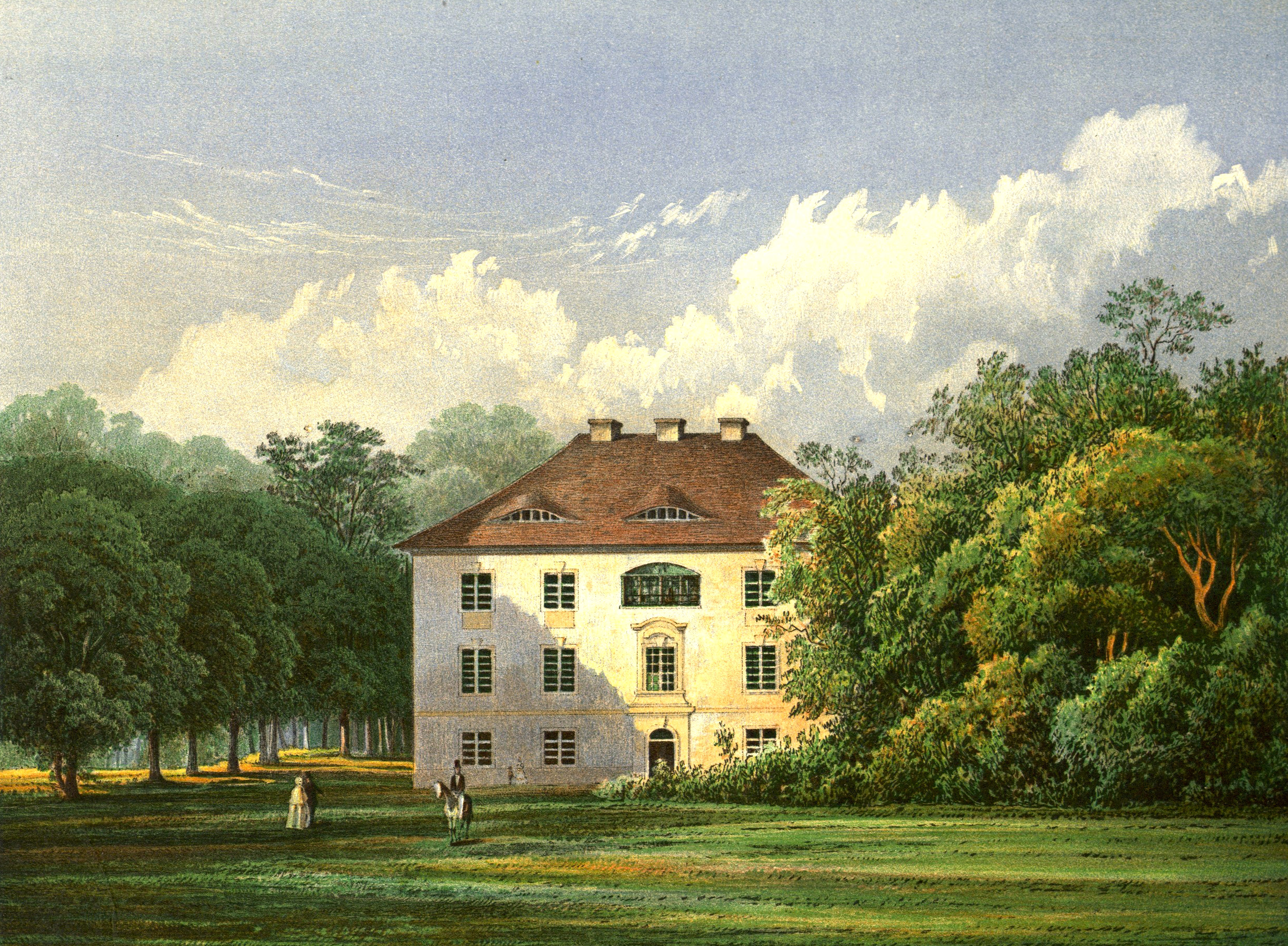 Schloss Alt Madlitz, Kreis Lebus, Provinz Brandenburg